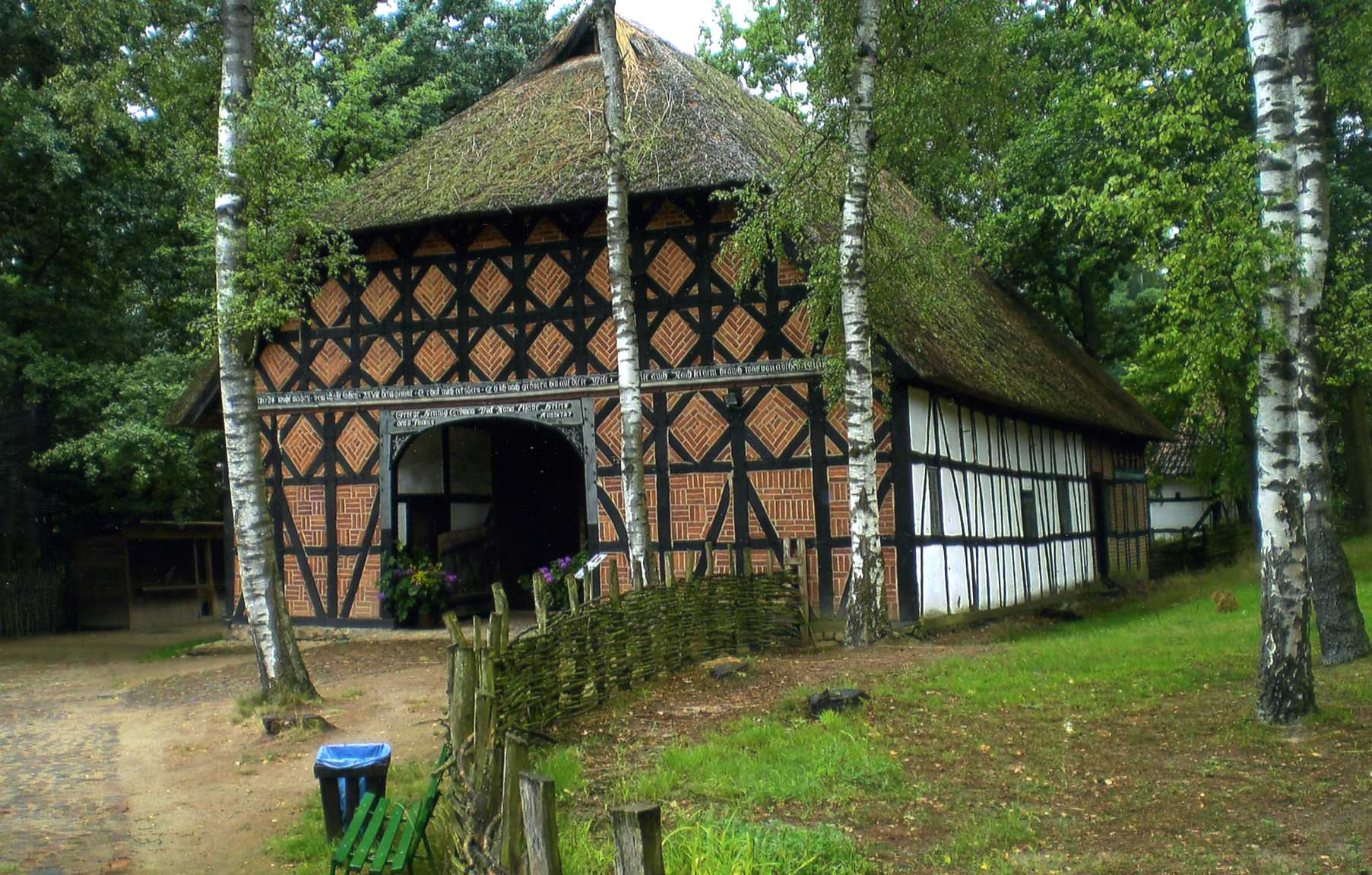 Niederdeutsches Hallenhaus im Freilichtmuseum Diesdorf (Altmark)